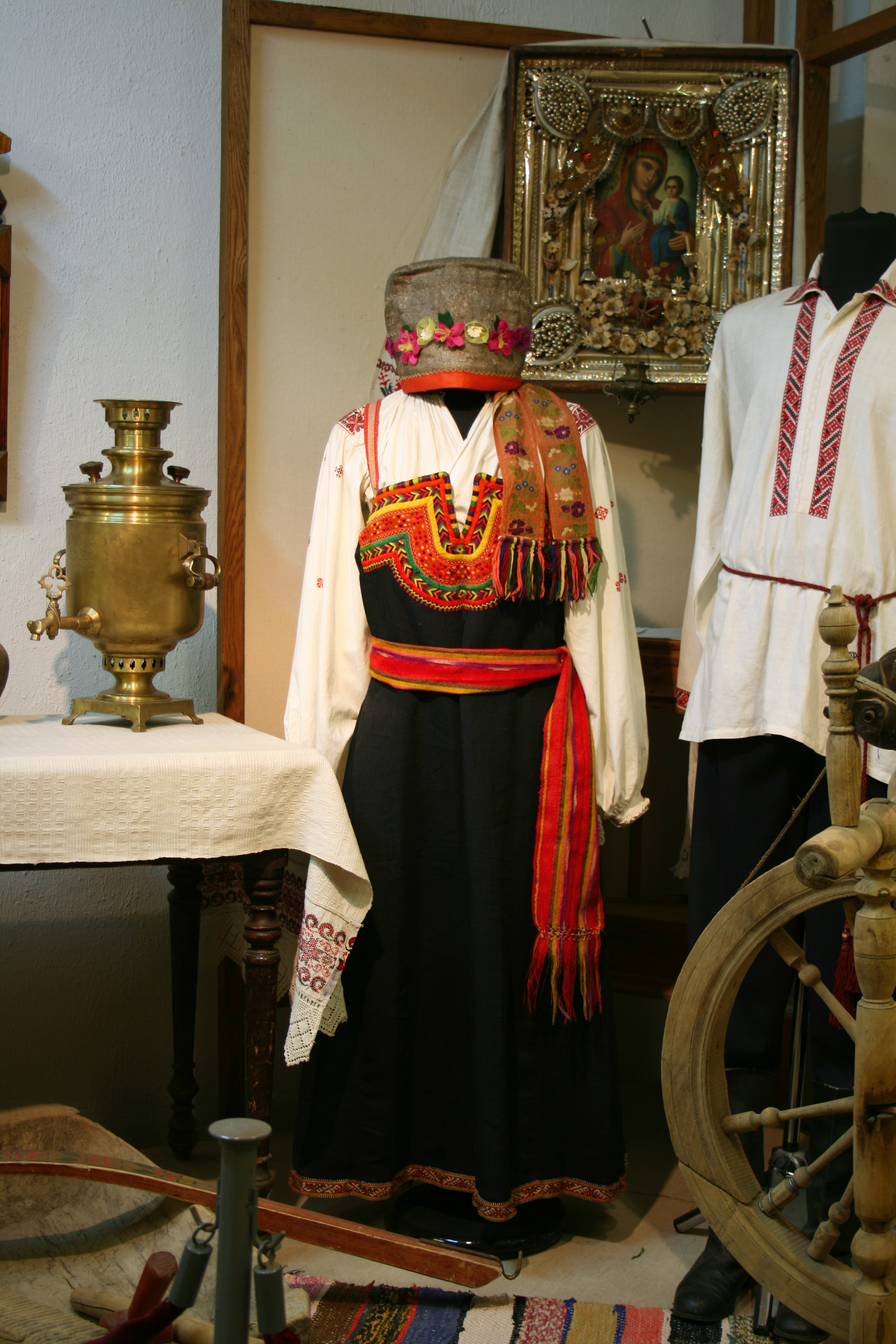 Экспозиция Шебекинского музея.